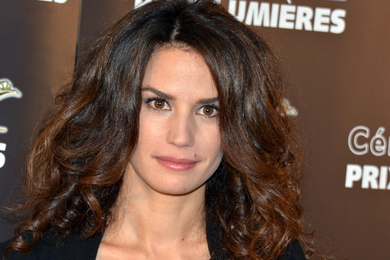 Barbara Cabrita à la cérémonie des prix Lumières